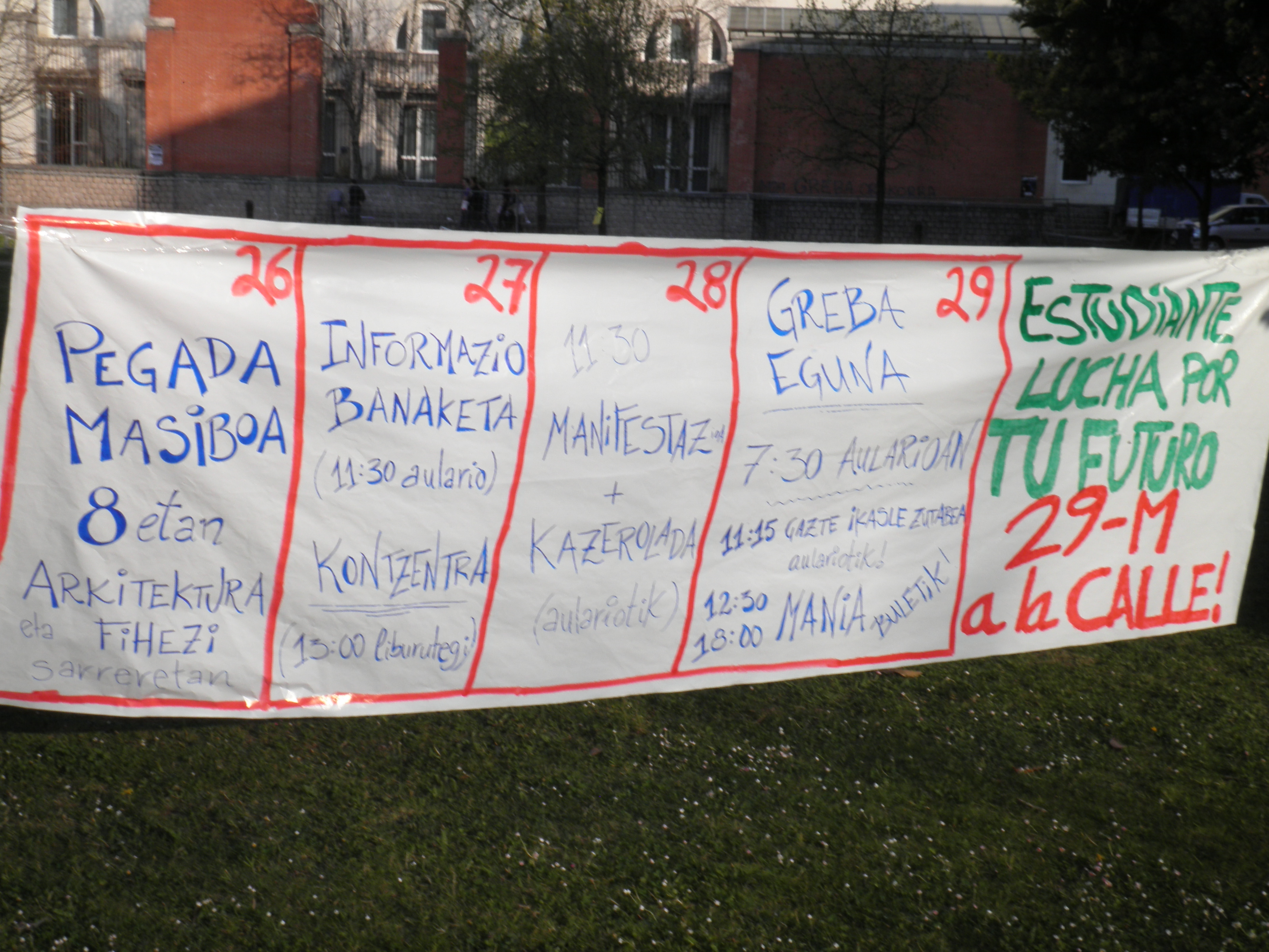 Pankarta Ibaetako kanpusean 2012ko martxoko graba orokorraren alde.